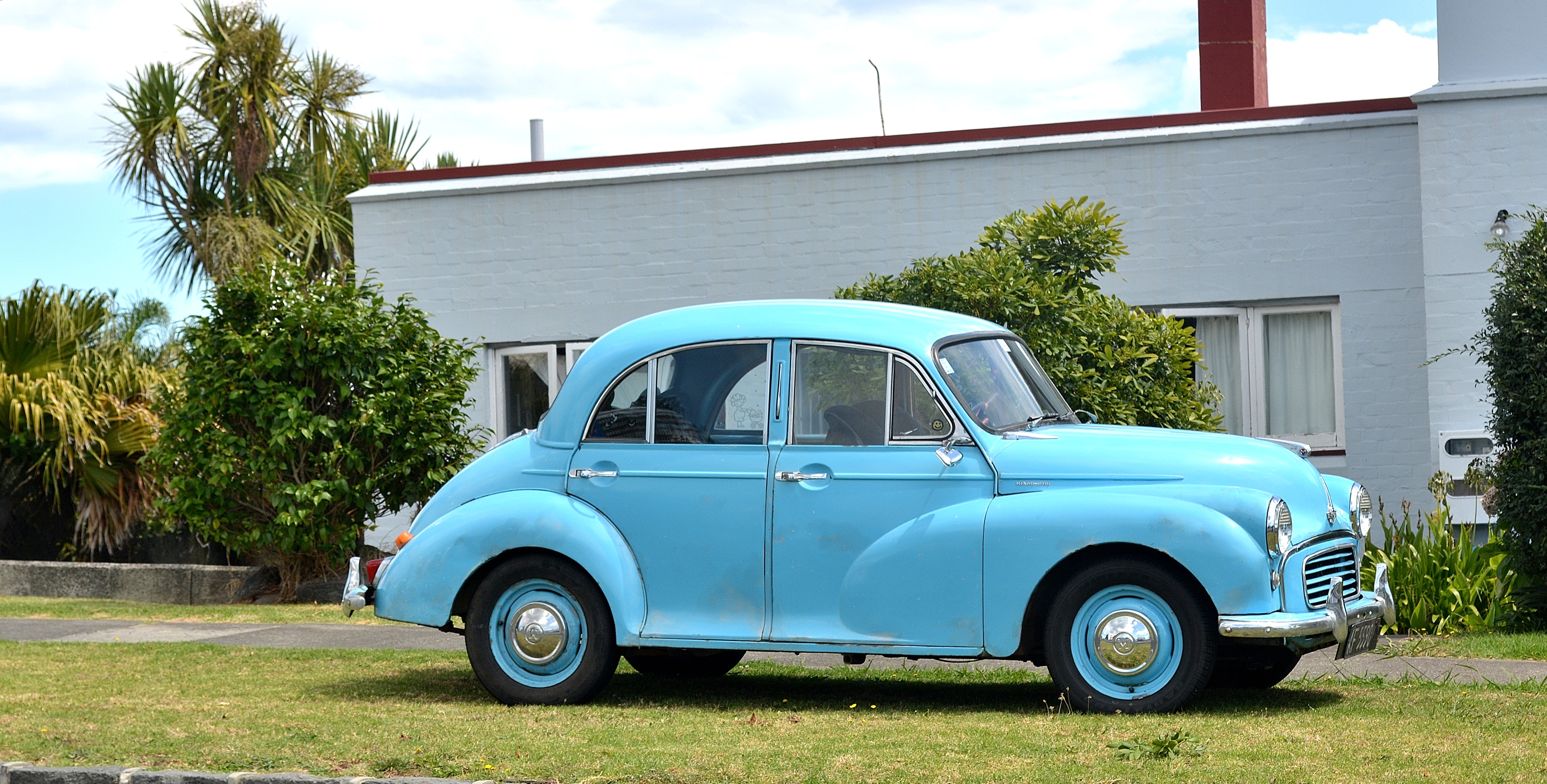 Orakei,East Auckland.New Zealand